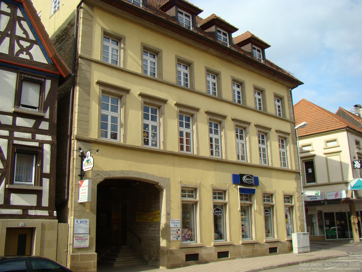 Historisches Gebäude Brettener Straße 20 in Eppingen